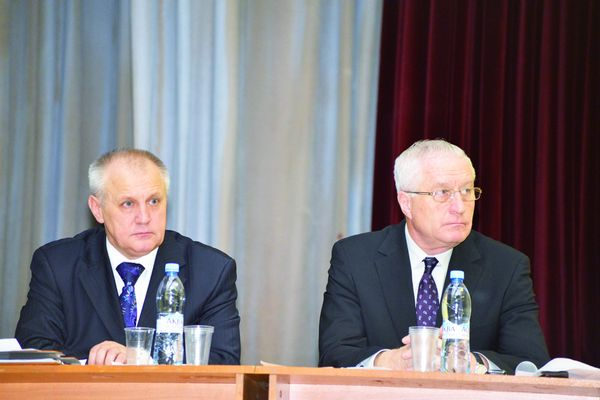 Сергей Владимирович Иванов (слева) и Николай Петрович Москалёв (справа) выступают во время народного заседания Городского поселения Львовский в 2013 году